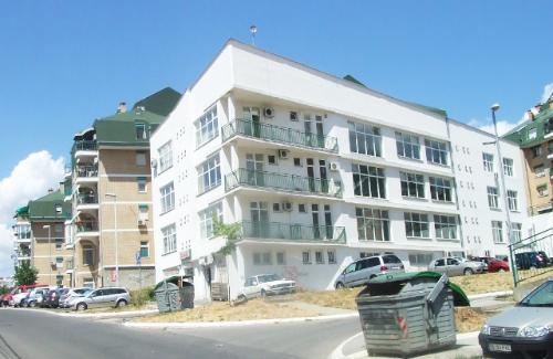 Zgrade u Filmskom gradu